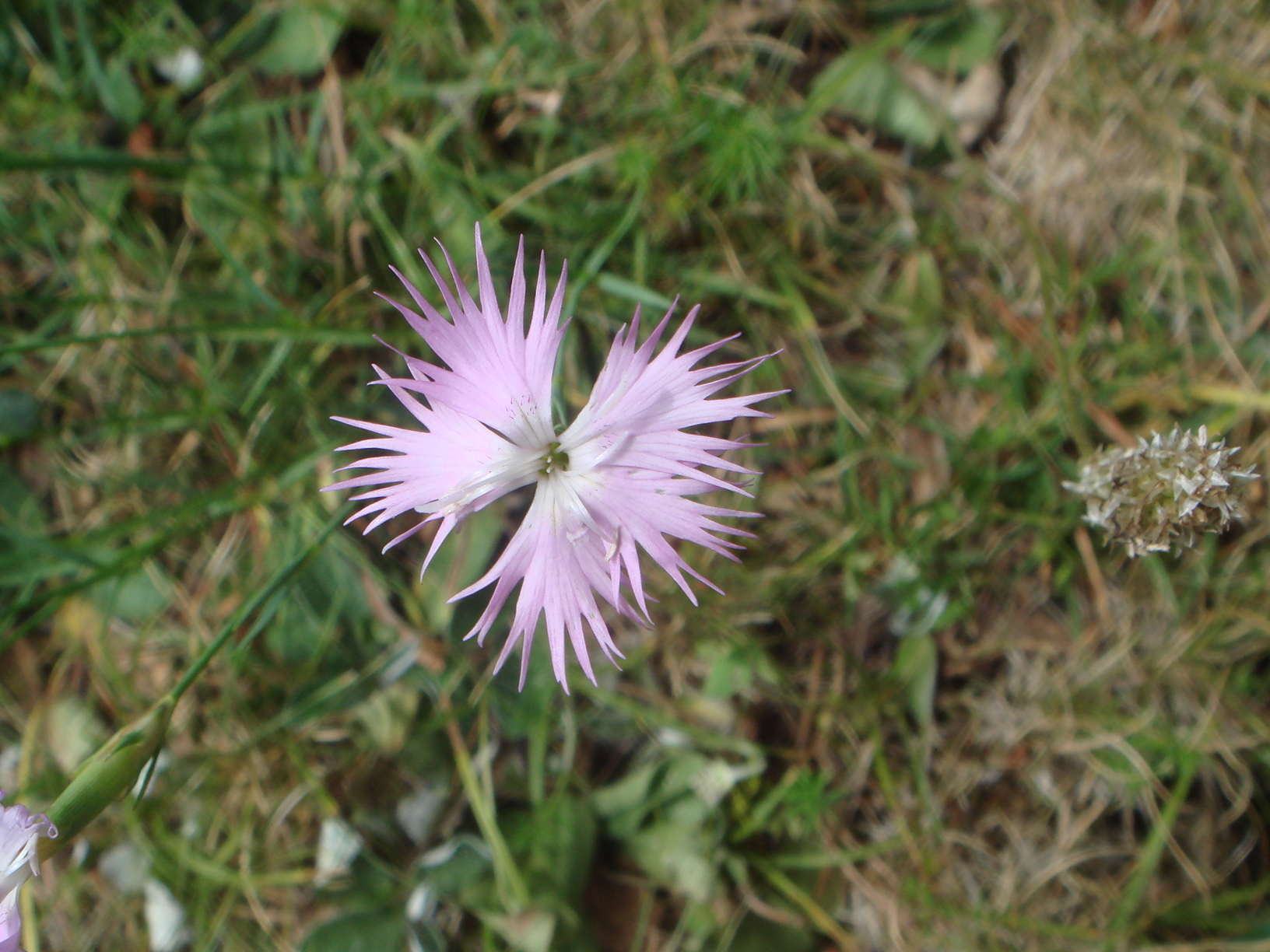 Dianthus hyssopifolius, Valle de Barrosa, Pirineos, (Huesca), España